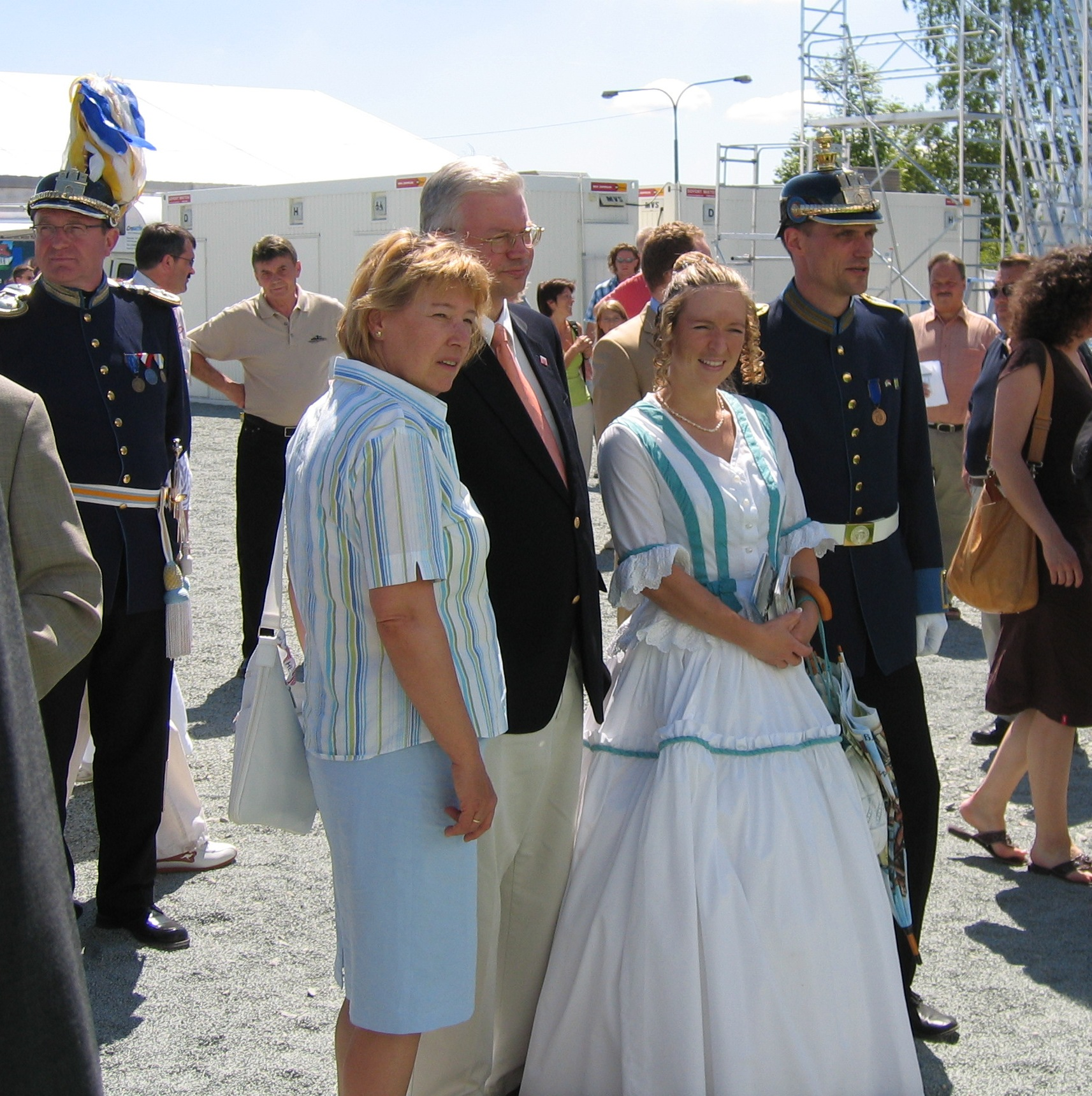 Hessentagspaar 2005 (rechts) mit Roland Koch, Hessentag 2005 in Weilburg.